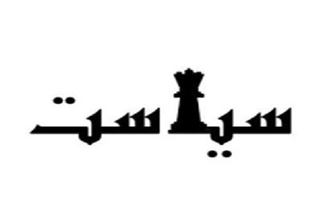 سیاست در ایران - شطرنج سیاسی